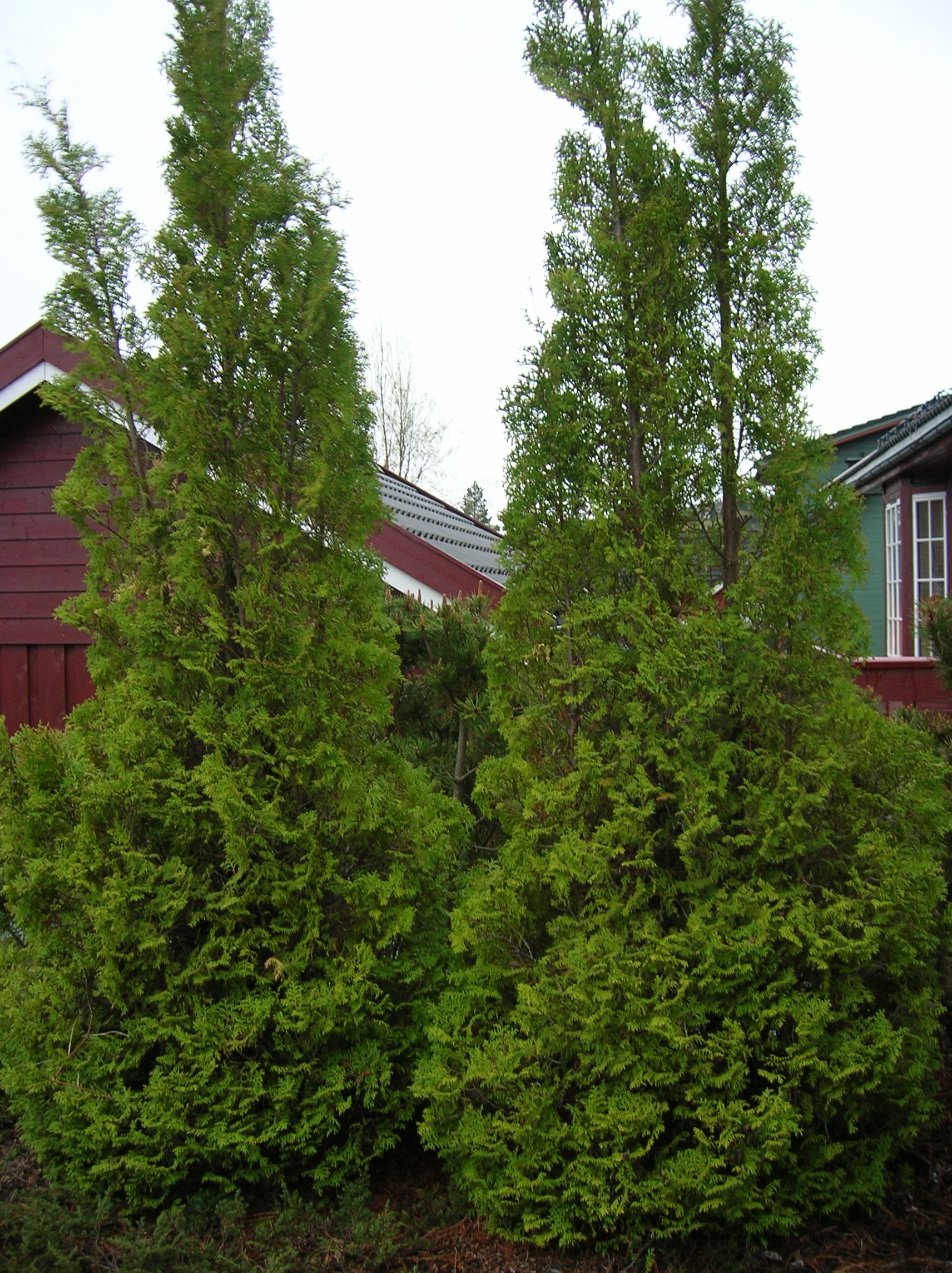 A Thuja occidentalis (no: Vanlig tuja)